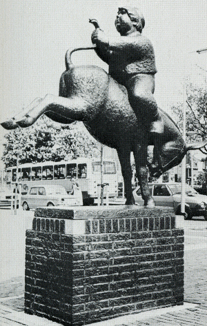 Dit is een beeld van Dik Trom, de foto is afkomstig uit een familiealbum en dateert uit de jaren 70. Het beeld is te vinden op het Marktplein te Hoofddorp.